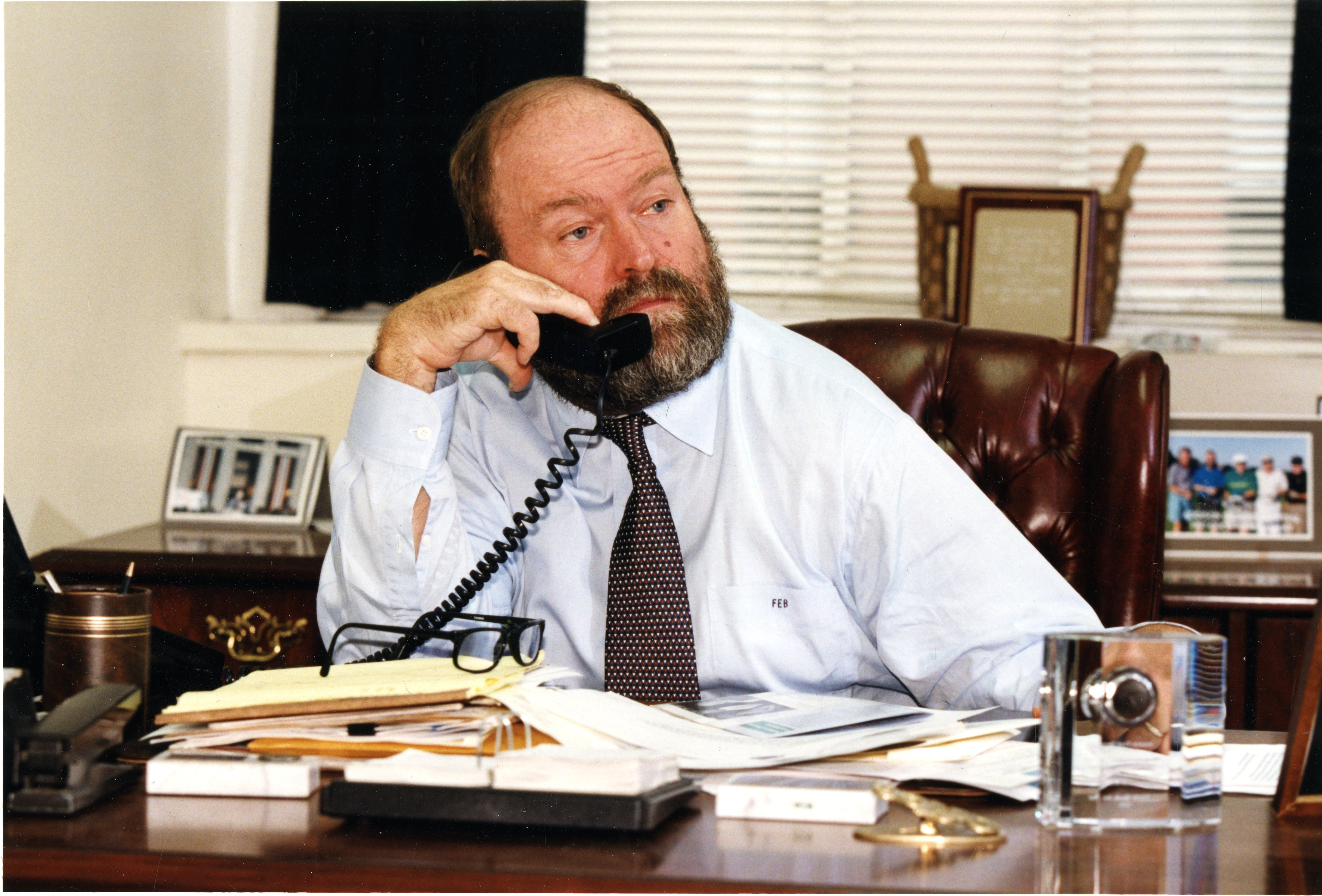 Senator Frederick E. Berry